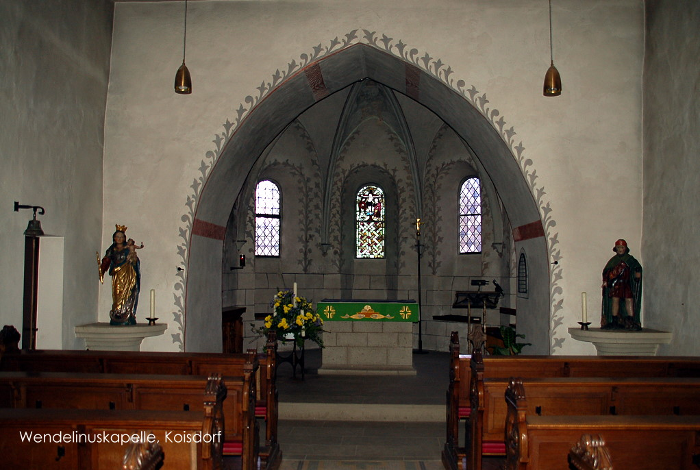 Altarraum der St. Wendelinkapelle in Koisdorf